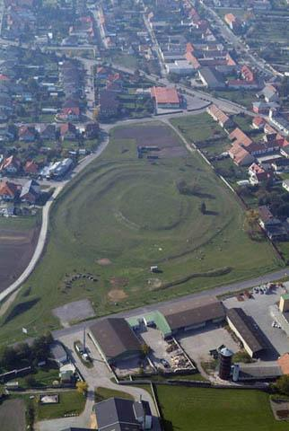 Leithaprodersdorf, Austria, aerialphotography, Hausberg Gschlössl